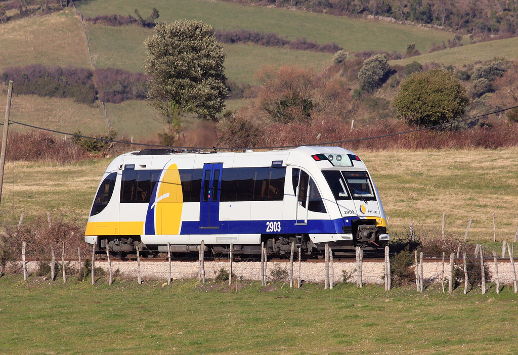 Unidad 2903 de Feve haciendo un servicio Bilbao-León. Villasana de Mena.